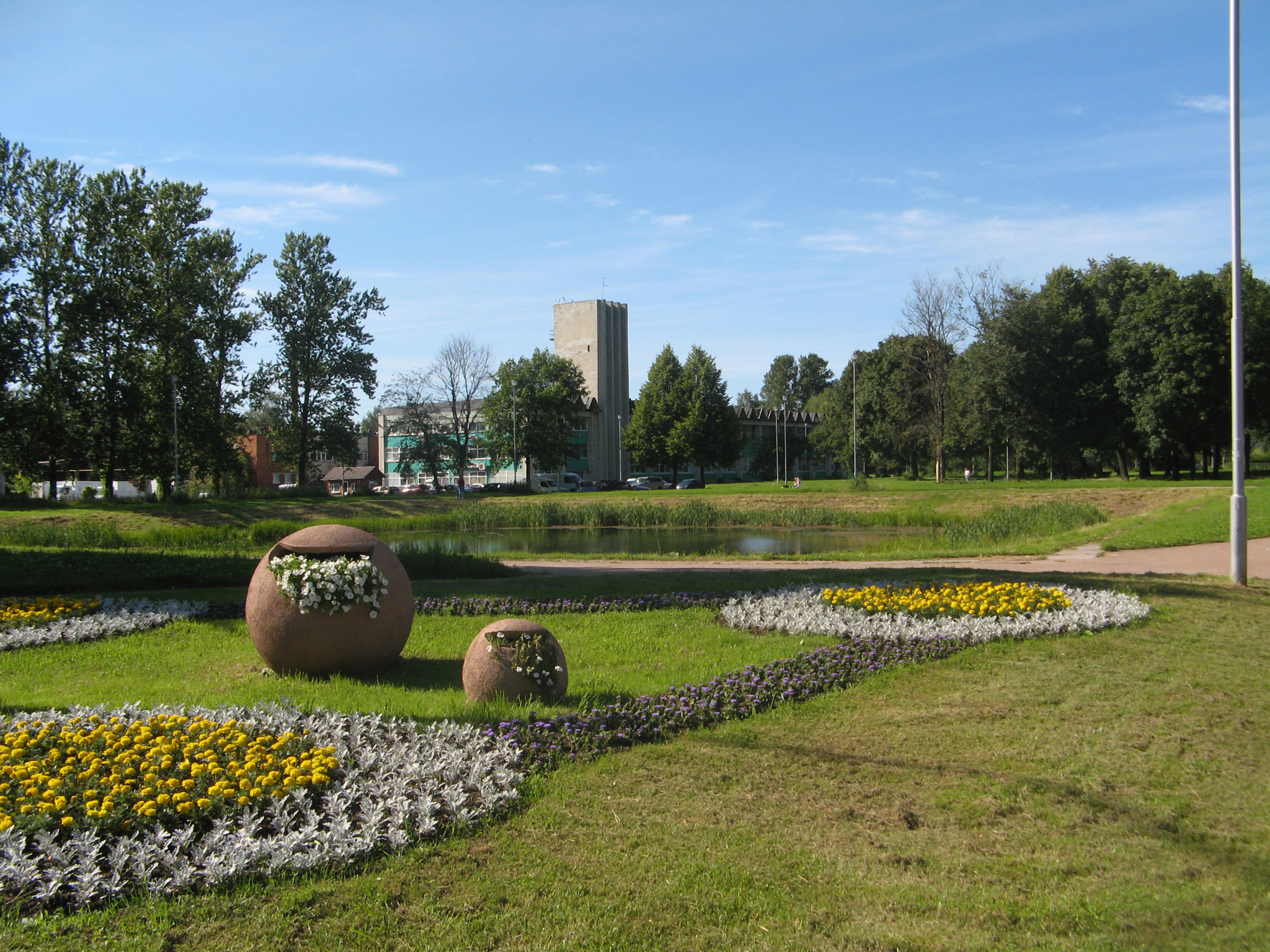 Полюстровский парк в Санкт-Петербурге